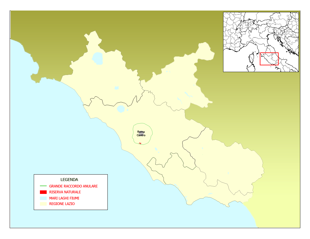 Mappa della riserva naturale Laurentino Acqua Acetosa, Lazio, Italia